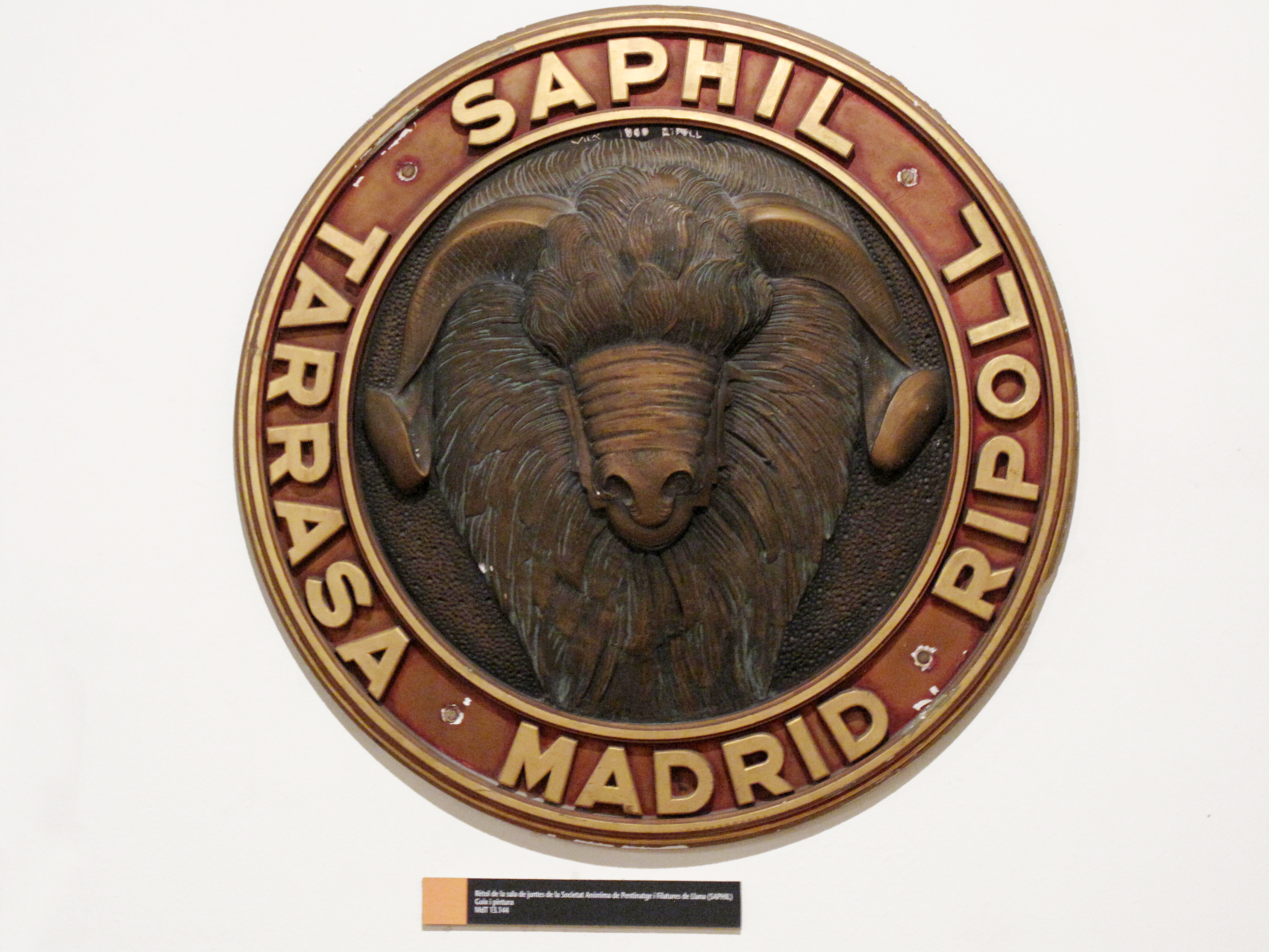 Castell cartoixa de Vallparadís (Terrassa)